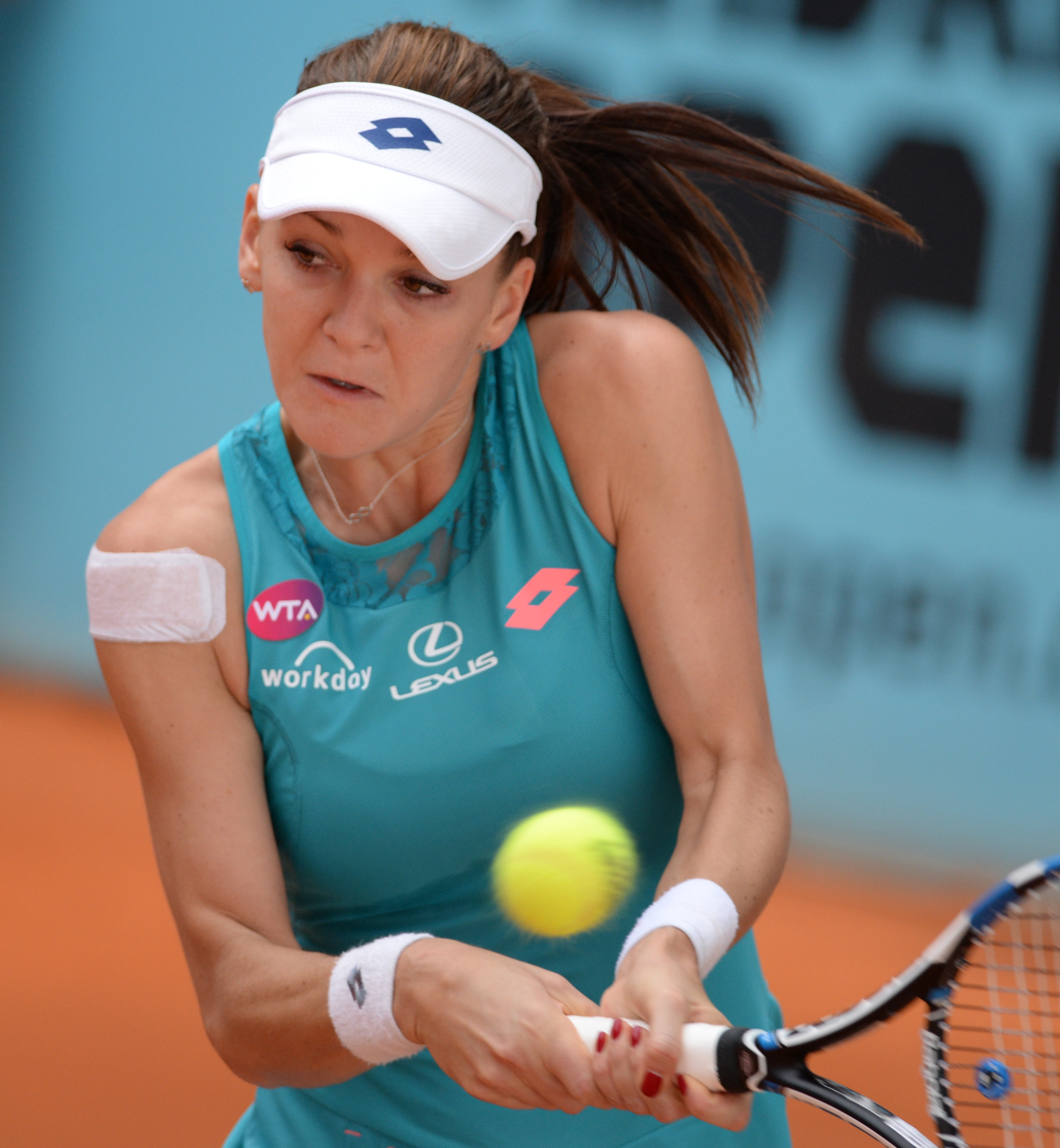 Agnieszka Radwanska